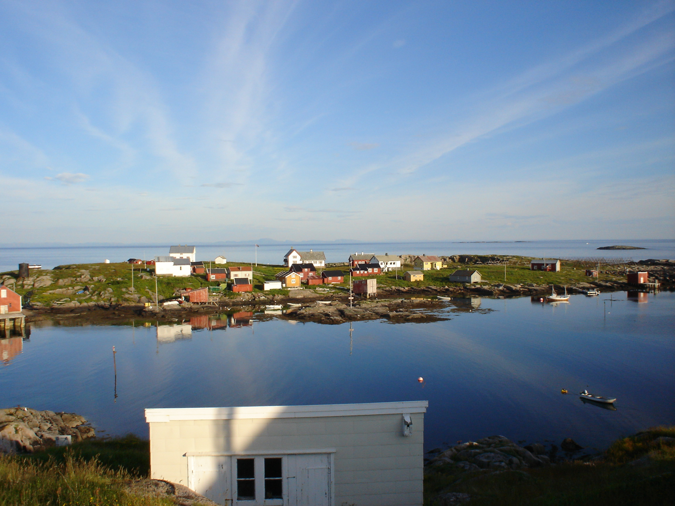 Husøya i Halten